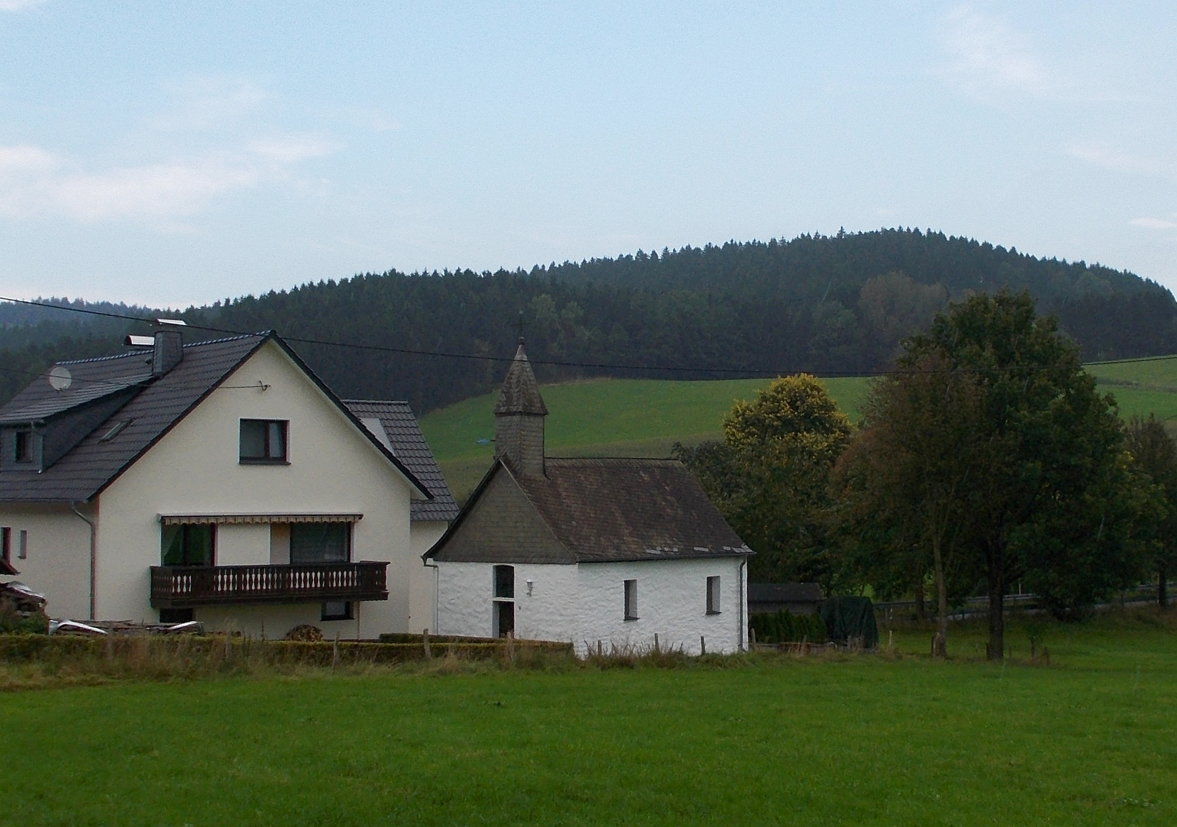 Kapelle St. Margaretha (Anno 1647) in Eslohe-Hengsbeck